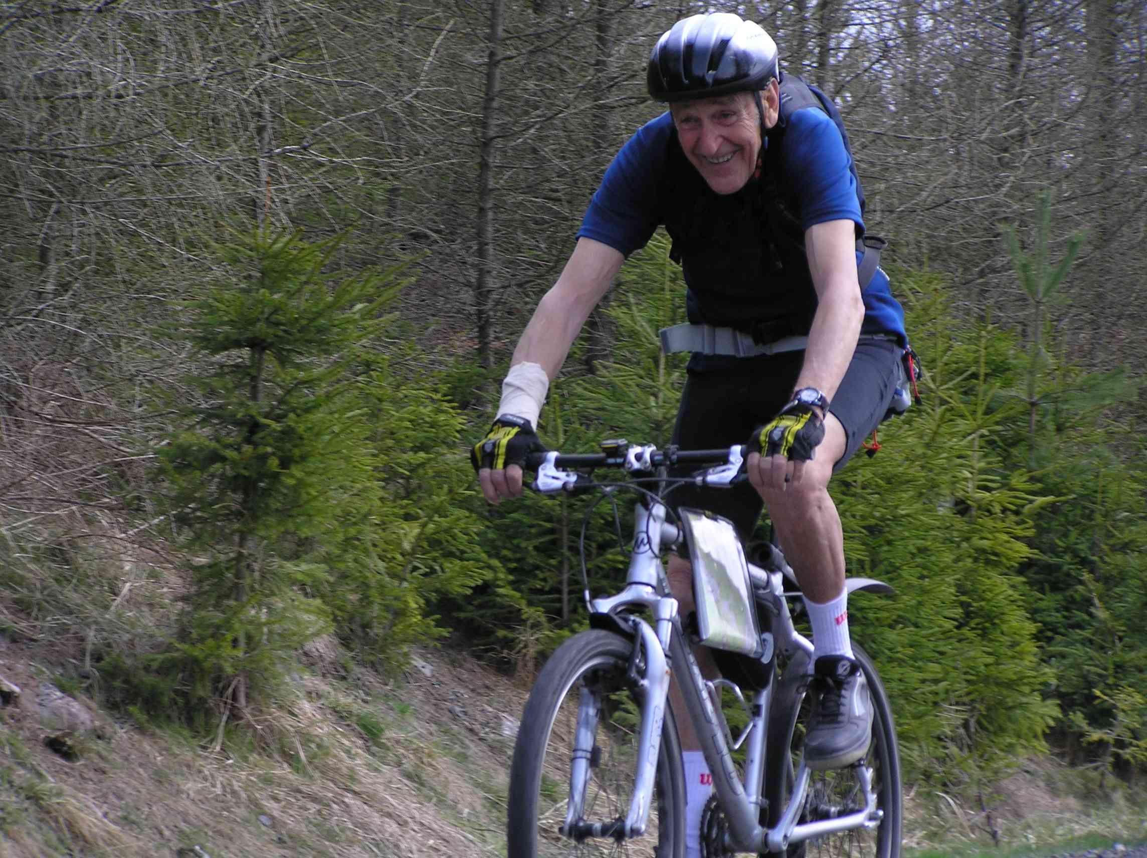 Hynek Hlasivec_cyklista